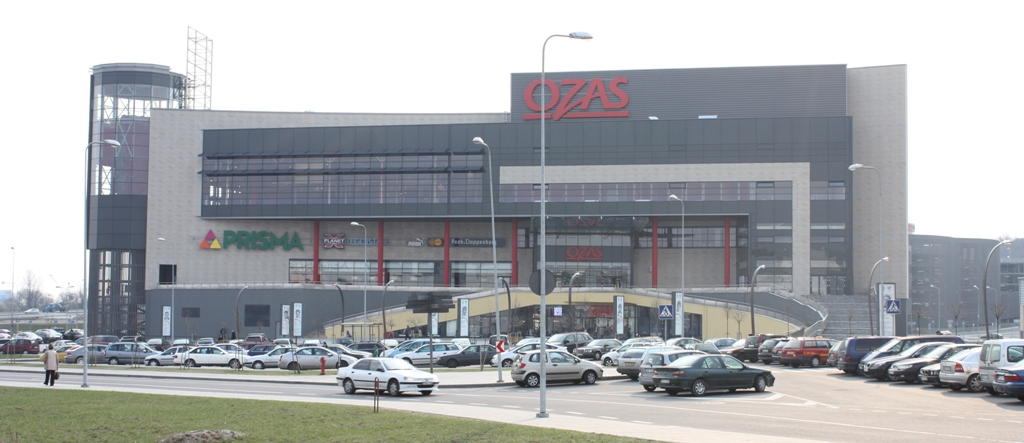 Prekybos centras "Ozas" Vilniuje